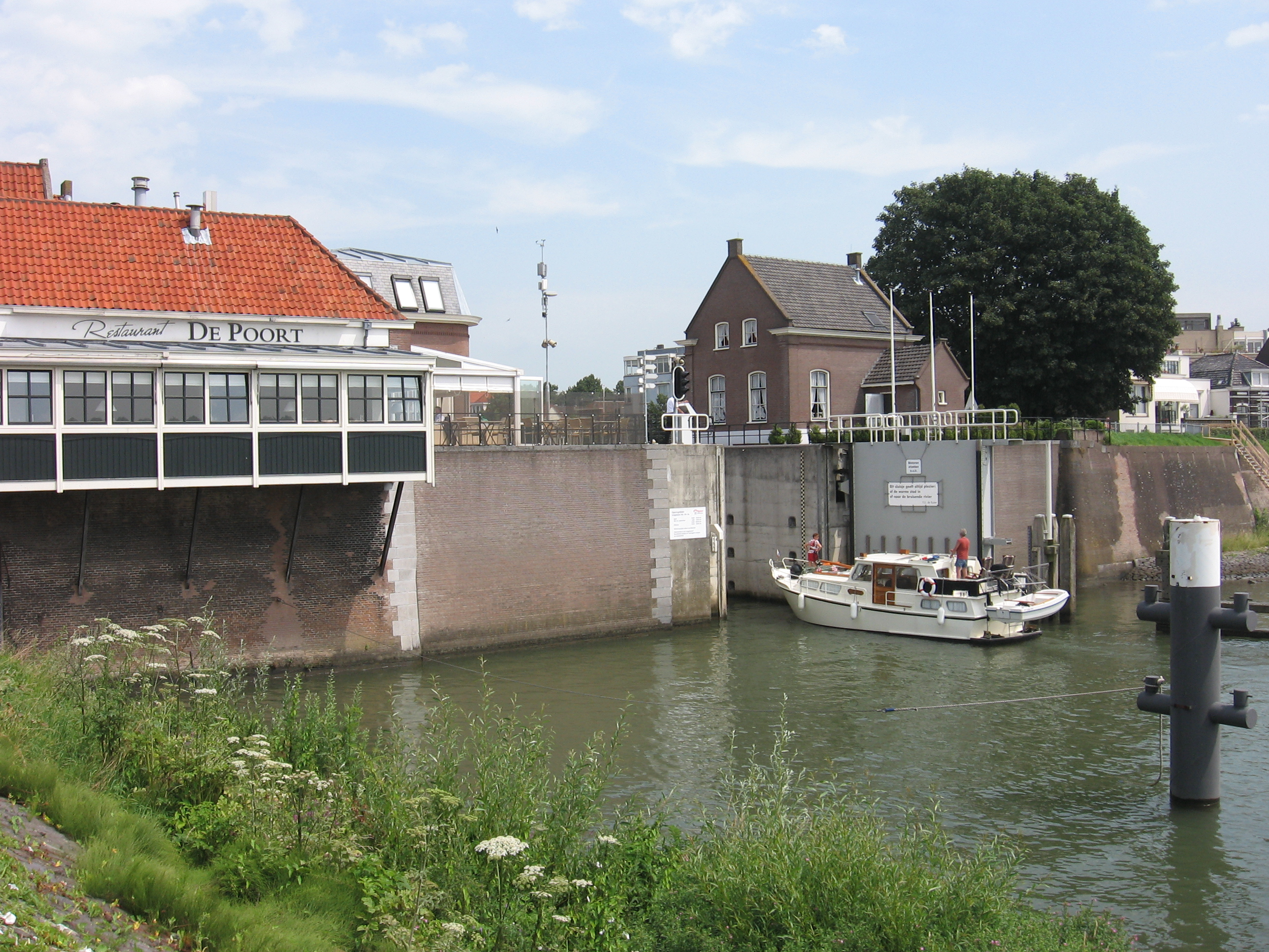 Zicht op een deel van de Lingesluis in Gorinchem